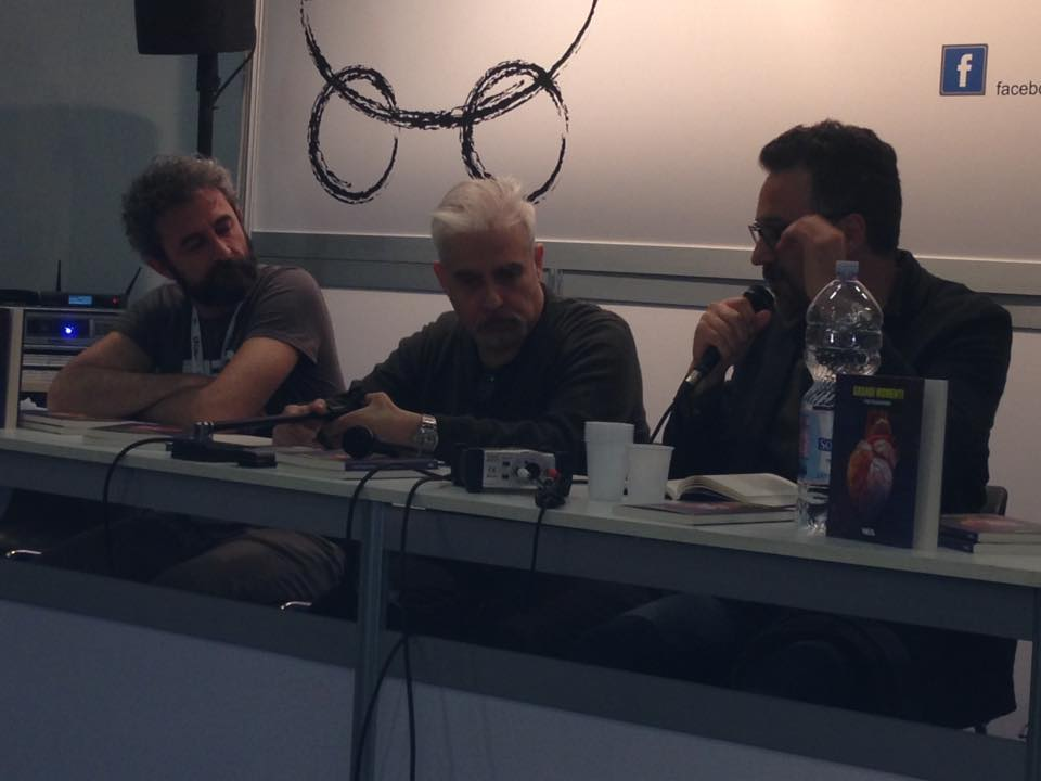 Franz Krauspenhaar Fiera del Libro Torino 2016